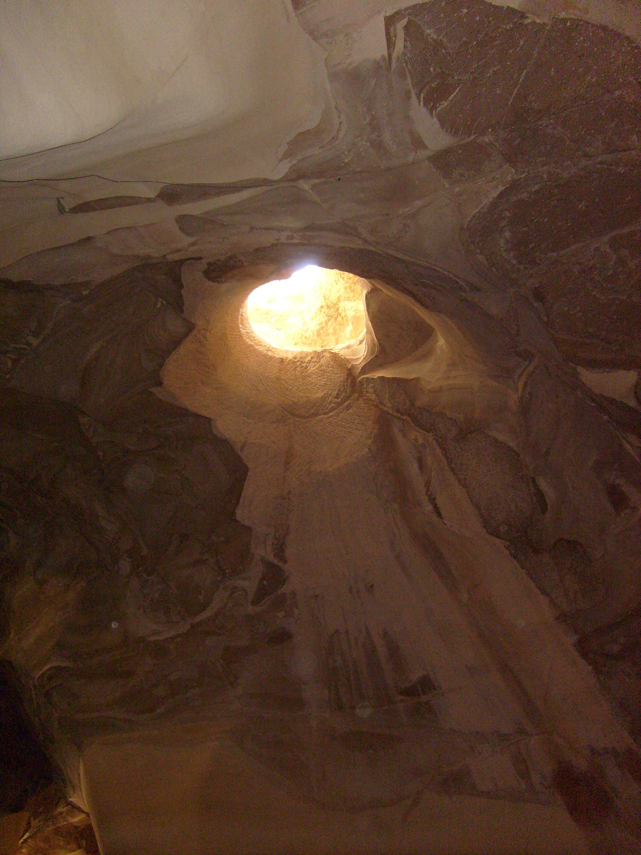 תקרת מערת פעמון בבית גוברין